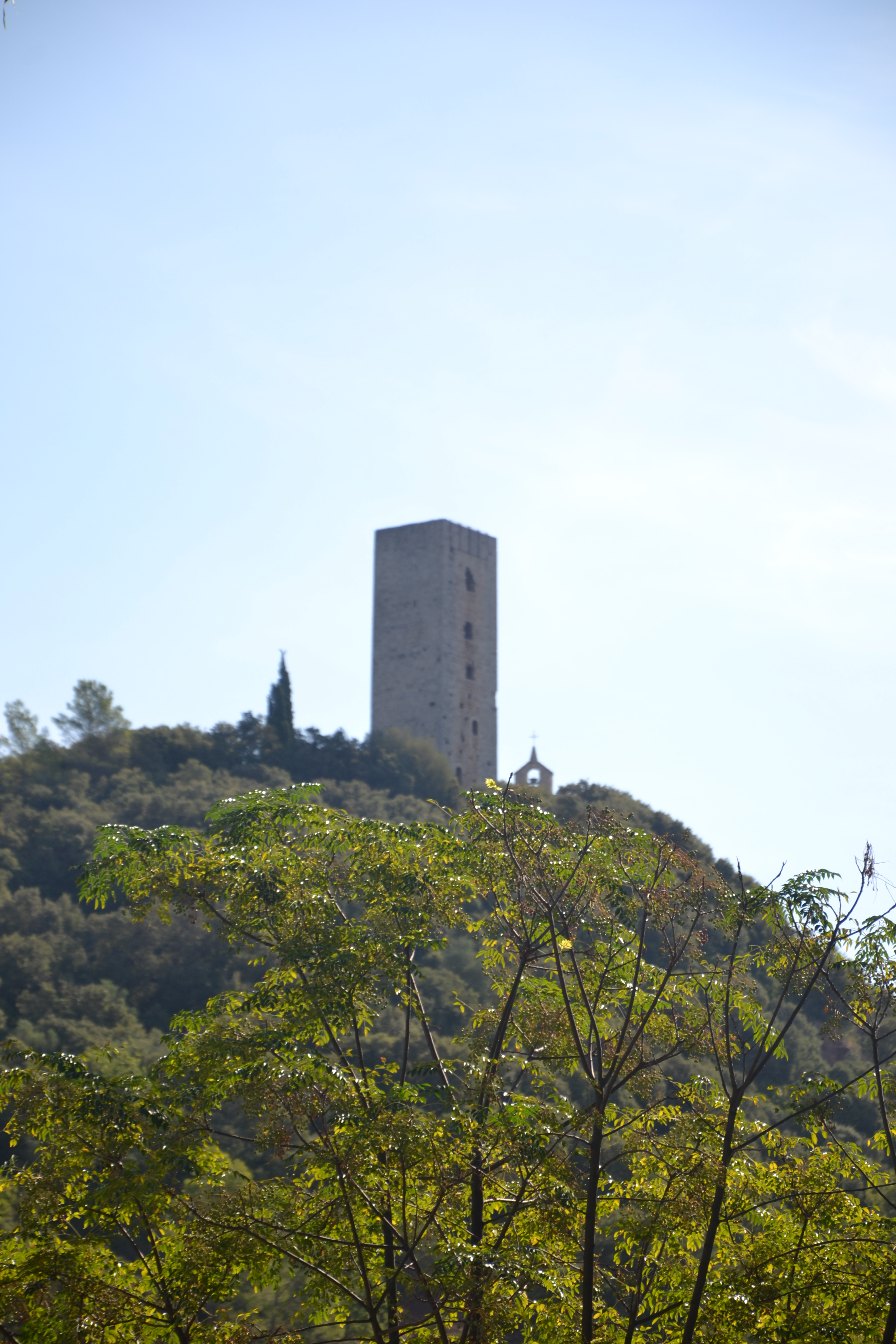 Taradelle de Taradeau